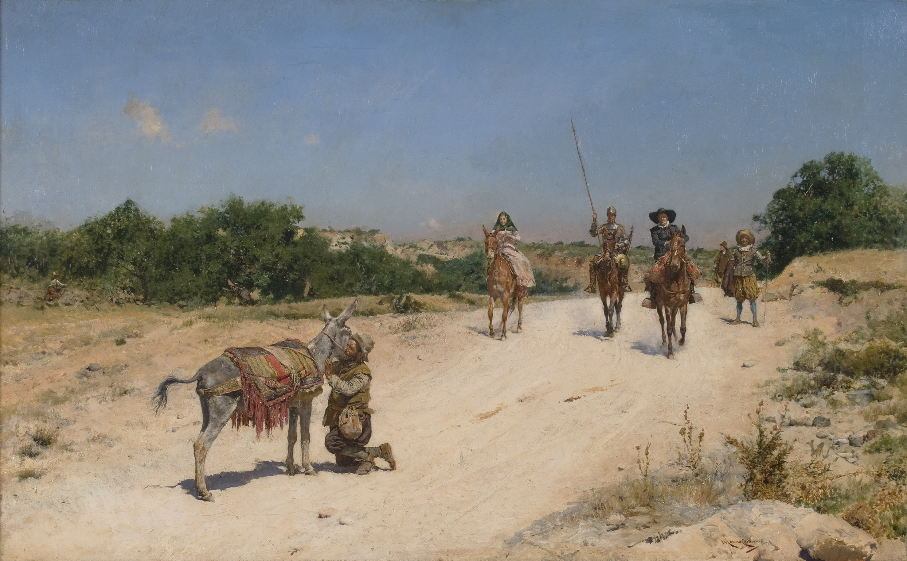 La obra representa un pasaje de la célebre novela Don Quijote de la Mancha, que fue escrita a principios del siglo XVII por Miguel de Cervantes Saavedra.